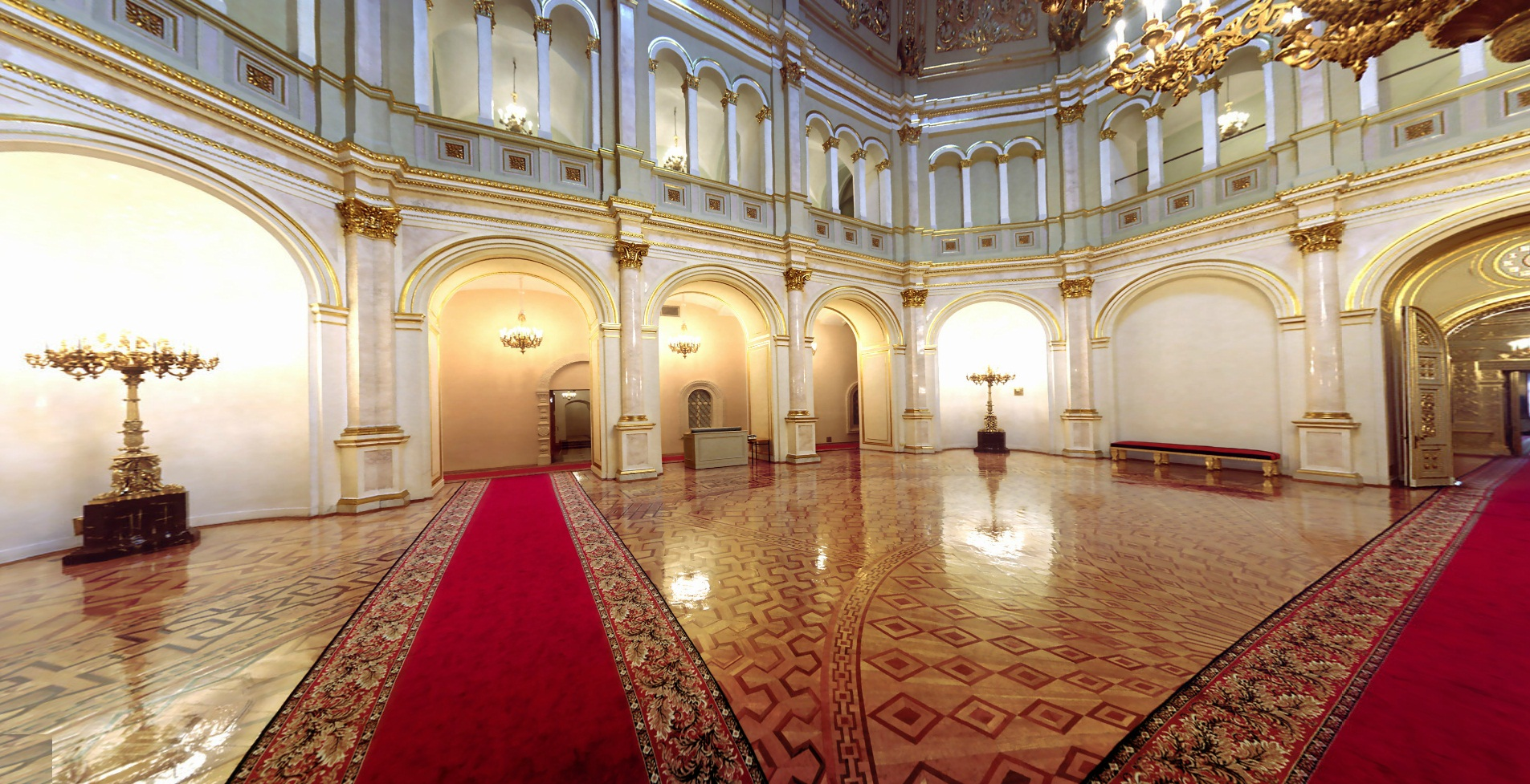 Владимирский зал Большого Кремлёвского дворца Московского Кремля